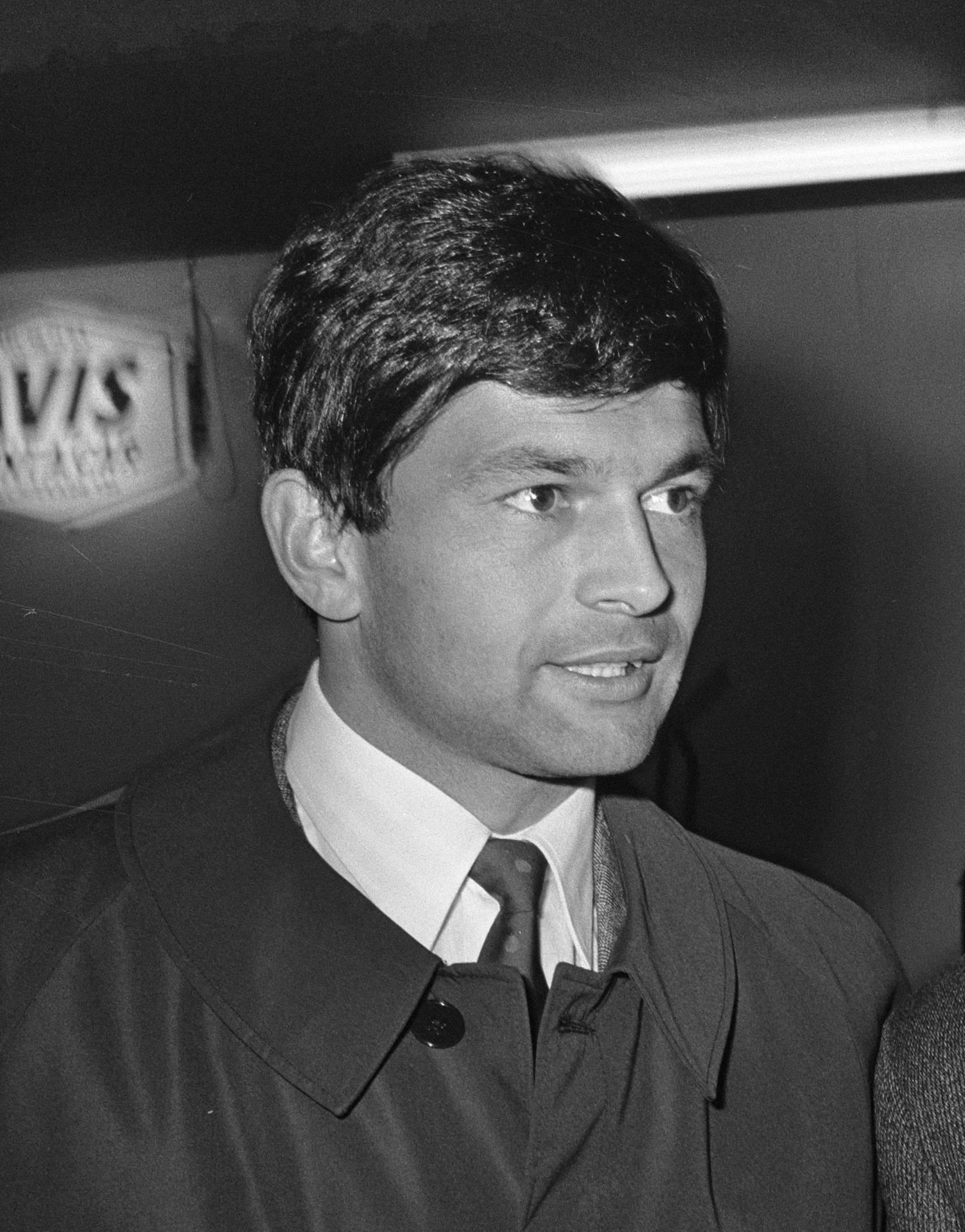 Bulgaars voetbalelftal arriveert op Zestienhoven. Asparouchov